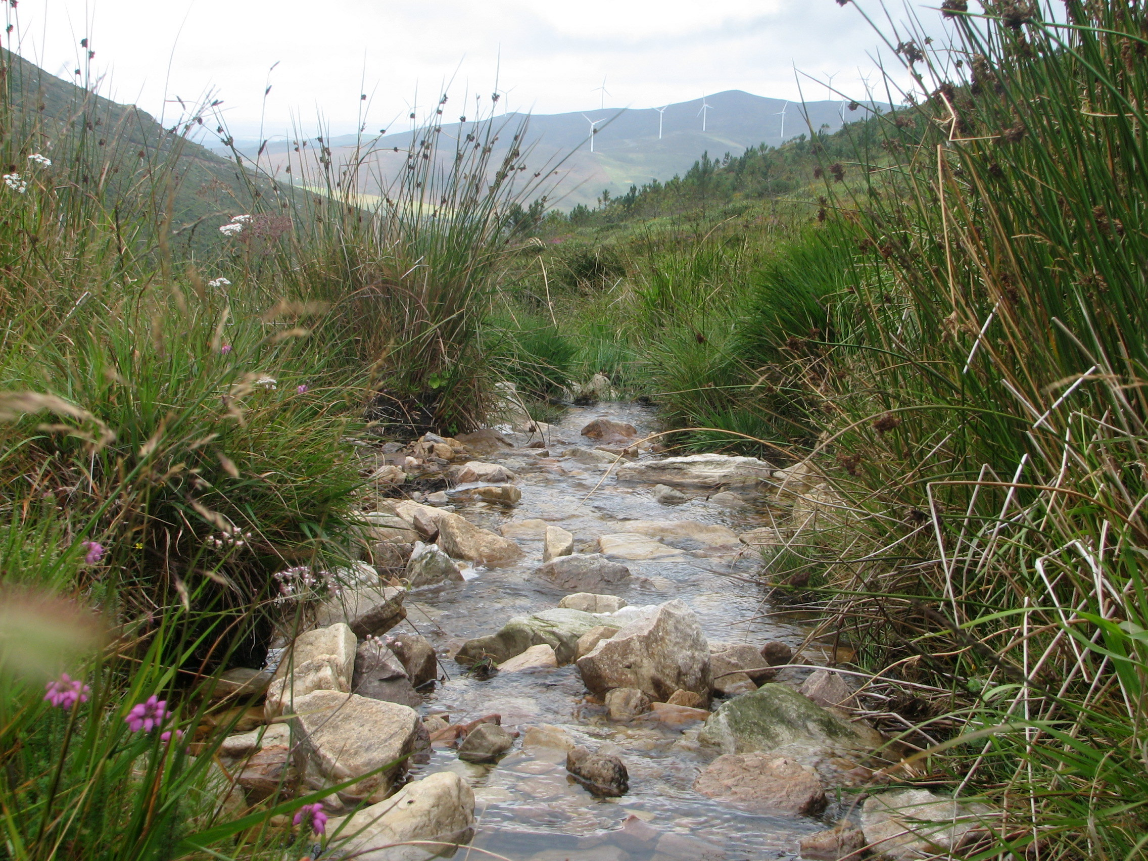 Nacemento do rio Landro na serra do Xistral